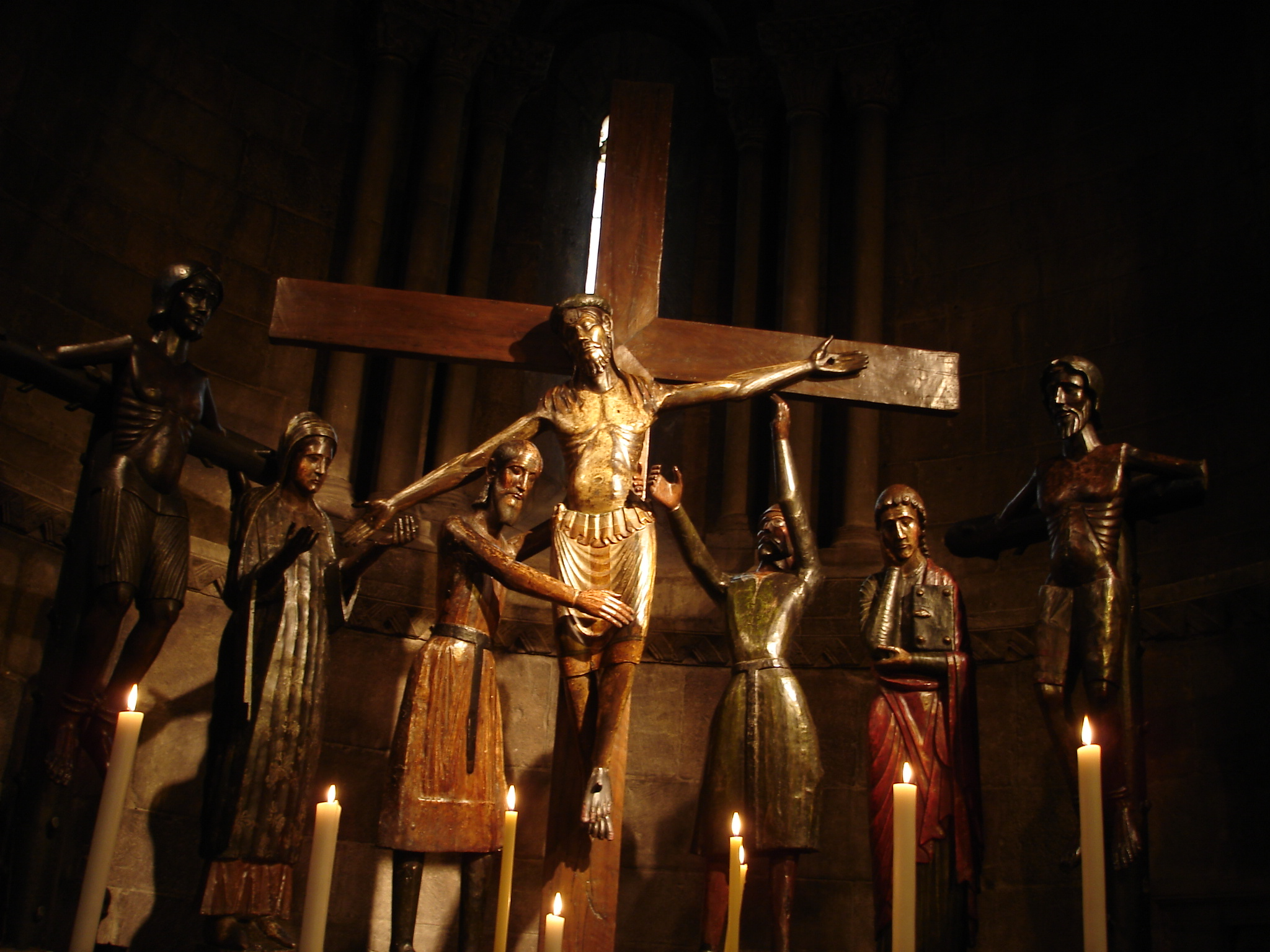 Catlunya Monestir de Sant Joan Abadesses Santissim Misteri sXII